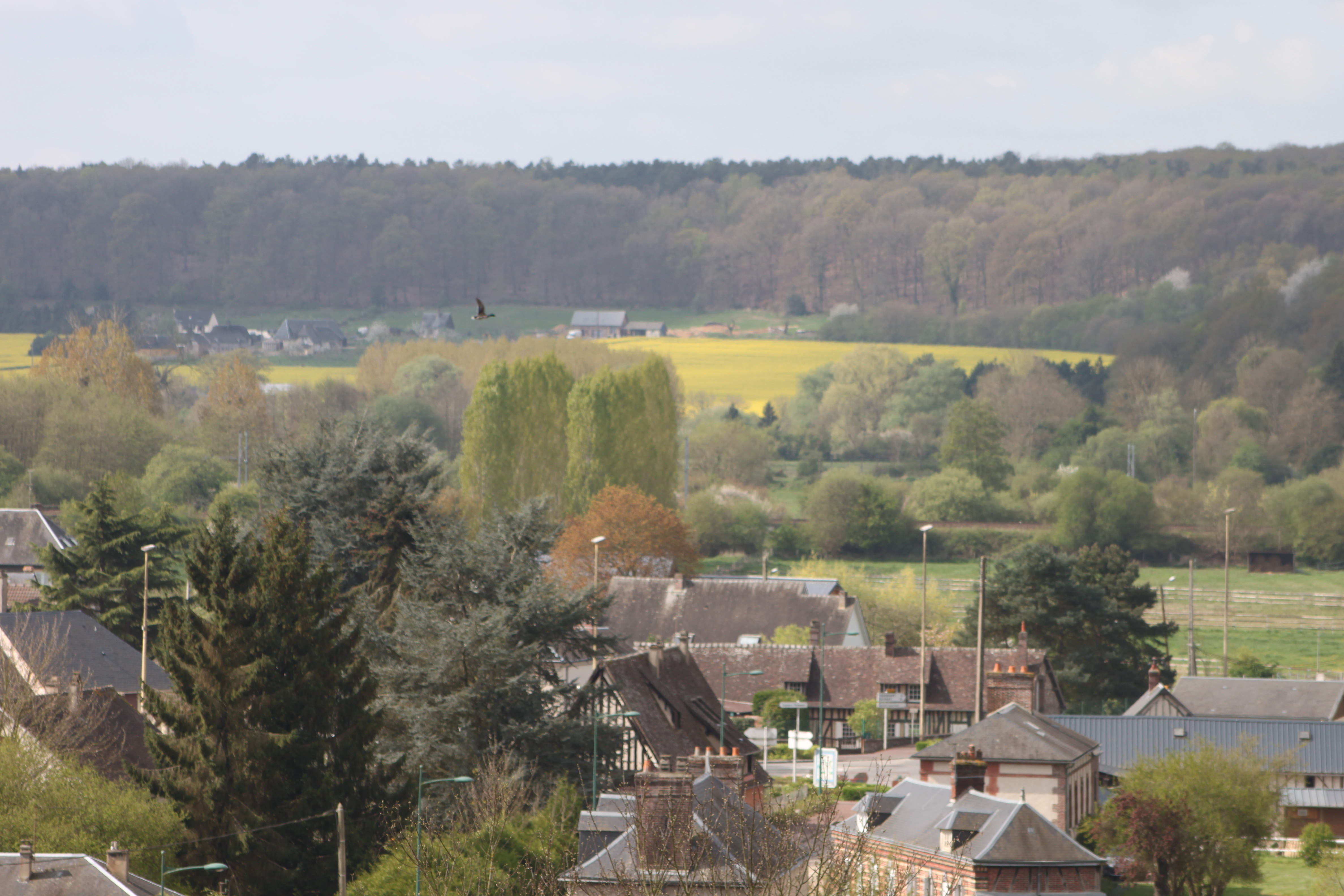 Vallée de la Risle à Beaumont-le-Roger vue depuis l'ancien prieuré